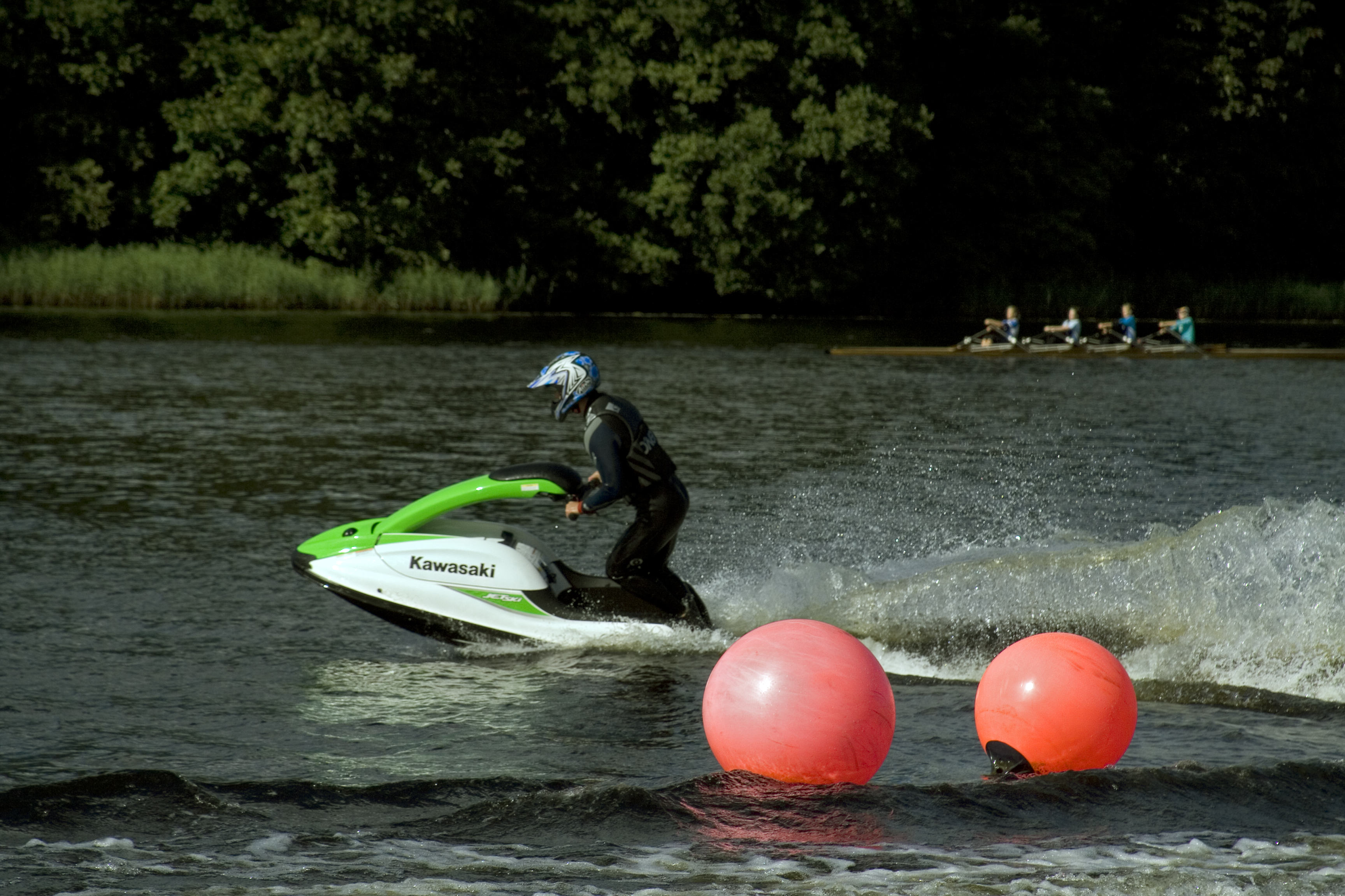 Skuuter Kawasaki Reiu jõel